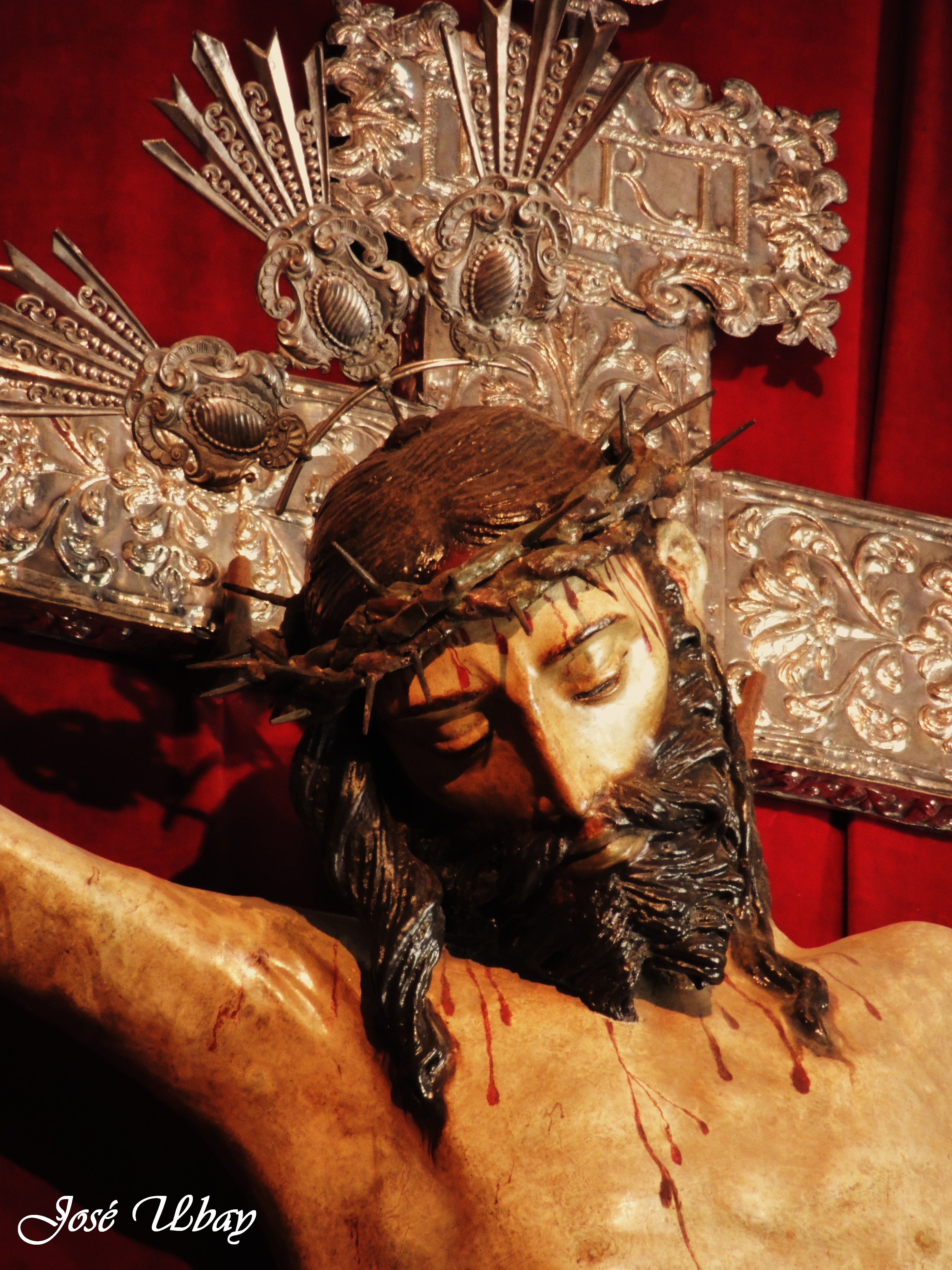 Santísimo Cristo de Telde. Siglo XVII. Matías de la Cerda, técnica de los Indios Tarascos de México. Basílica de san Juan Bautista (Telde).